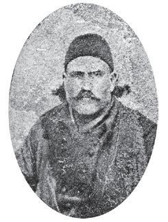 Печо Хаджиоглу.